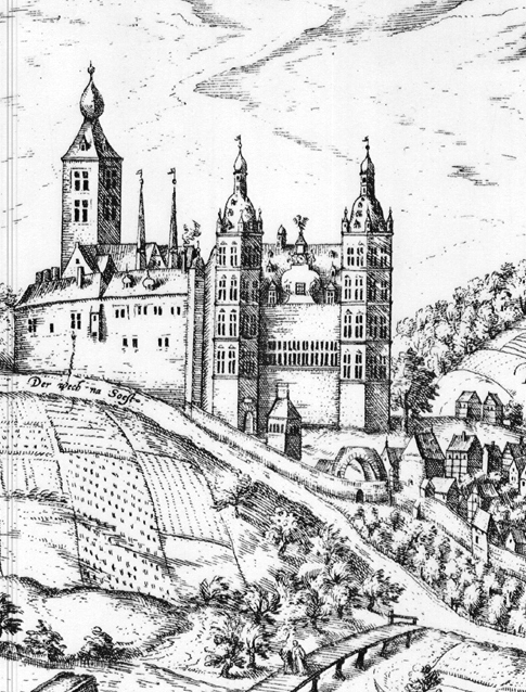 Ausschnitt aus der Darstellung Arnsberg im 16. Jahrhundert, Stich von Braun & Hogenberg